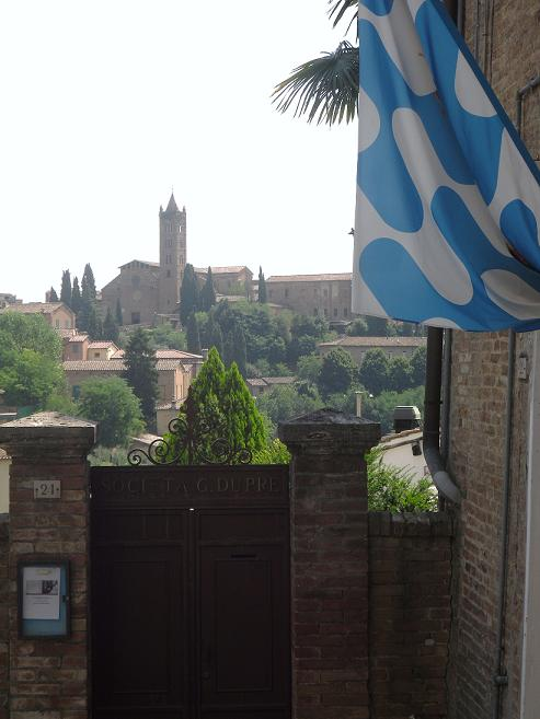 Ingresso della Società "Giovanni Duprè", società della Contrada Capitana dell'Onda, a Siena.